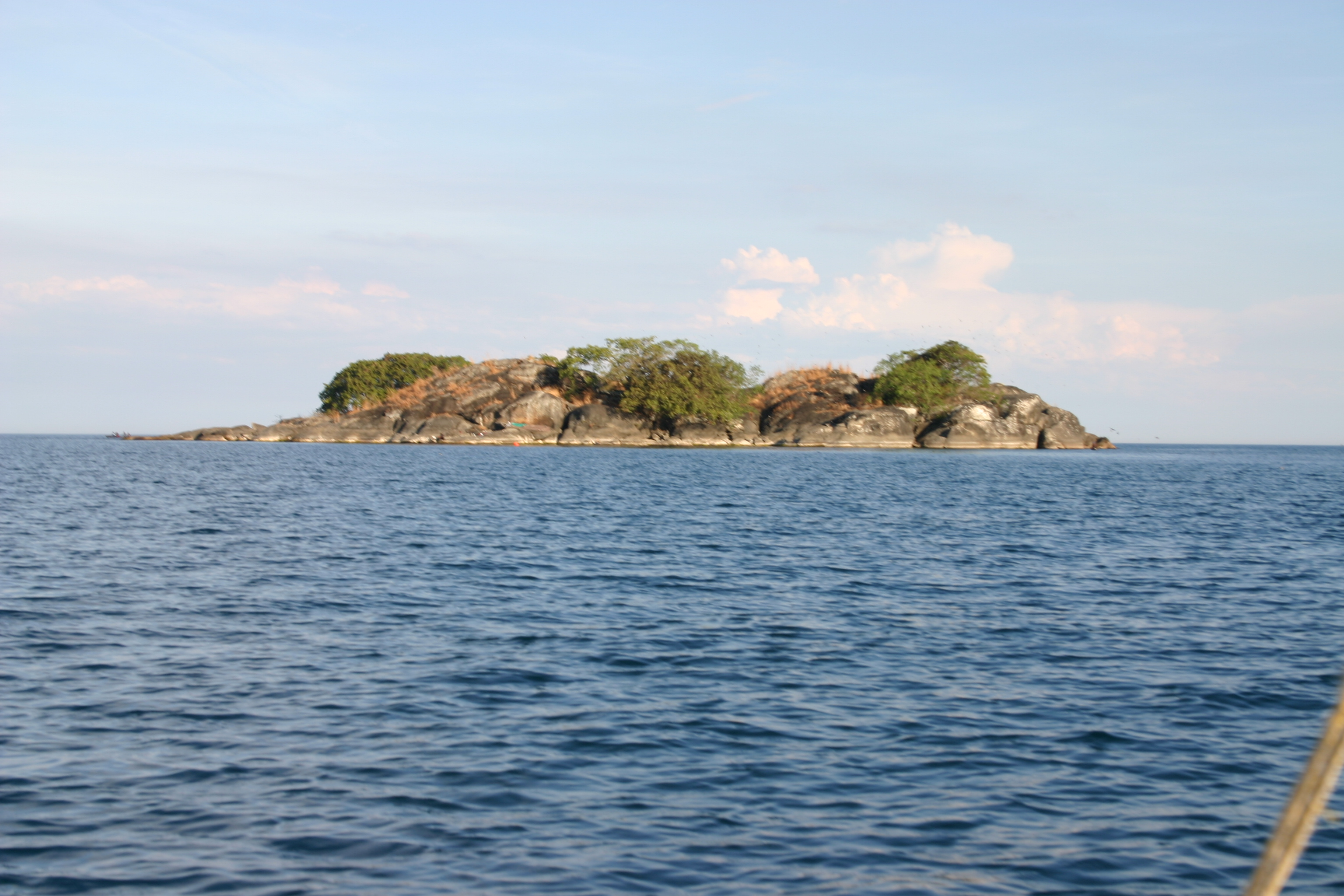 Island in Lake Malawi